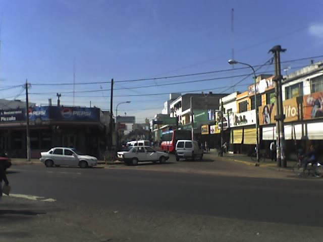 Avenidas Noguera y Rivadavia, ciudad de Padua, Provincia de Buenos Aires, Argentina.